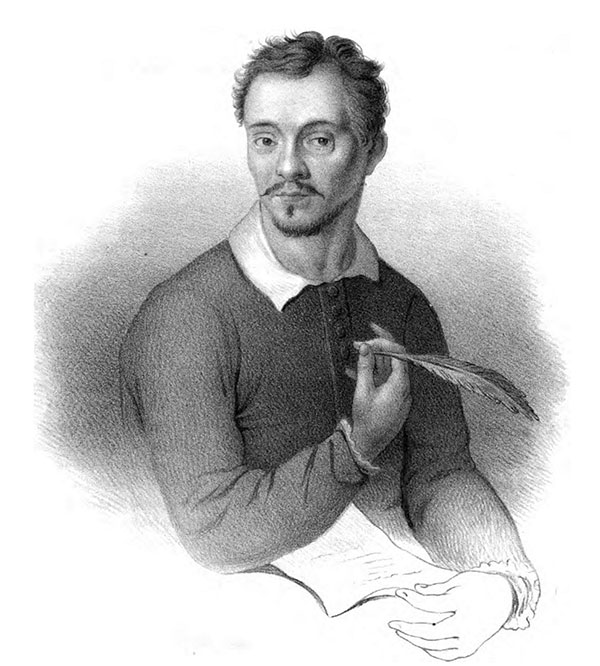 Lasse Lucidor (1638-1674)